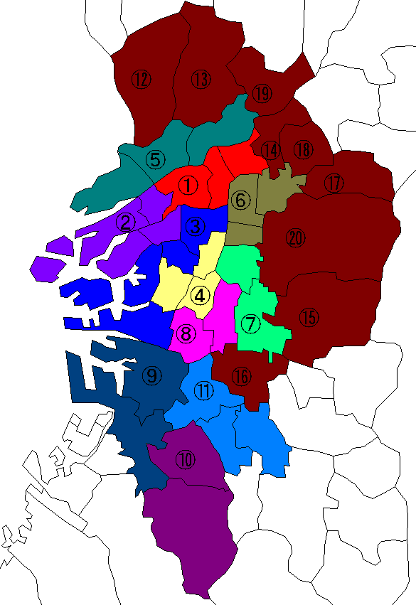 大阪都24区構想